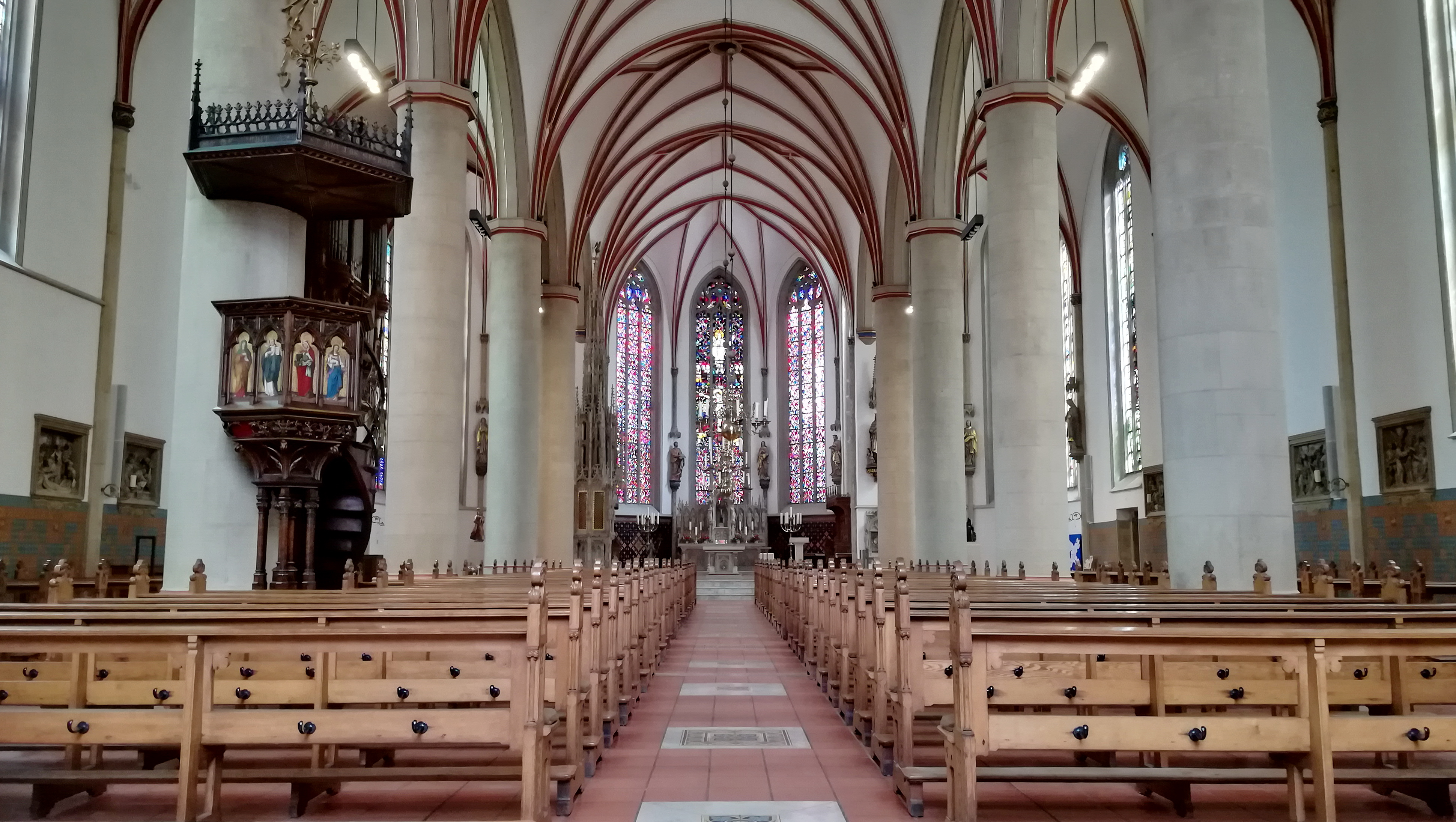 St. Felizitas ist die katholische Pfarrkirche im Zentrum der Stadt Lüdinghausen